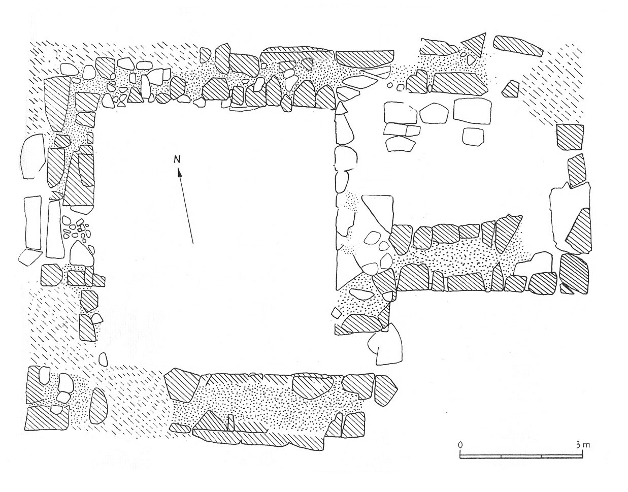 Ruinen efter högendiskyrkan på Tjörn, "Vår Frue kirke" eller tidigare även kallad capella beate Marie virginis, dvs den saliga Jungfru Marias kapell. Kyrkan byggdes troligen på 1100-talet.